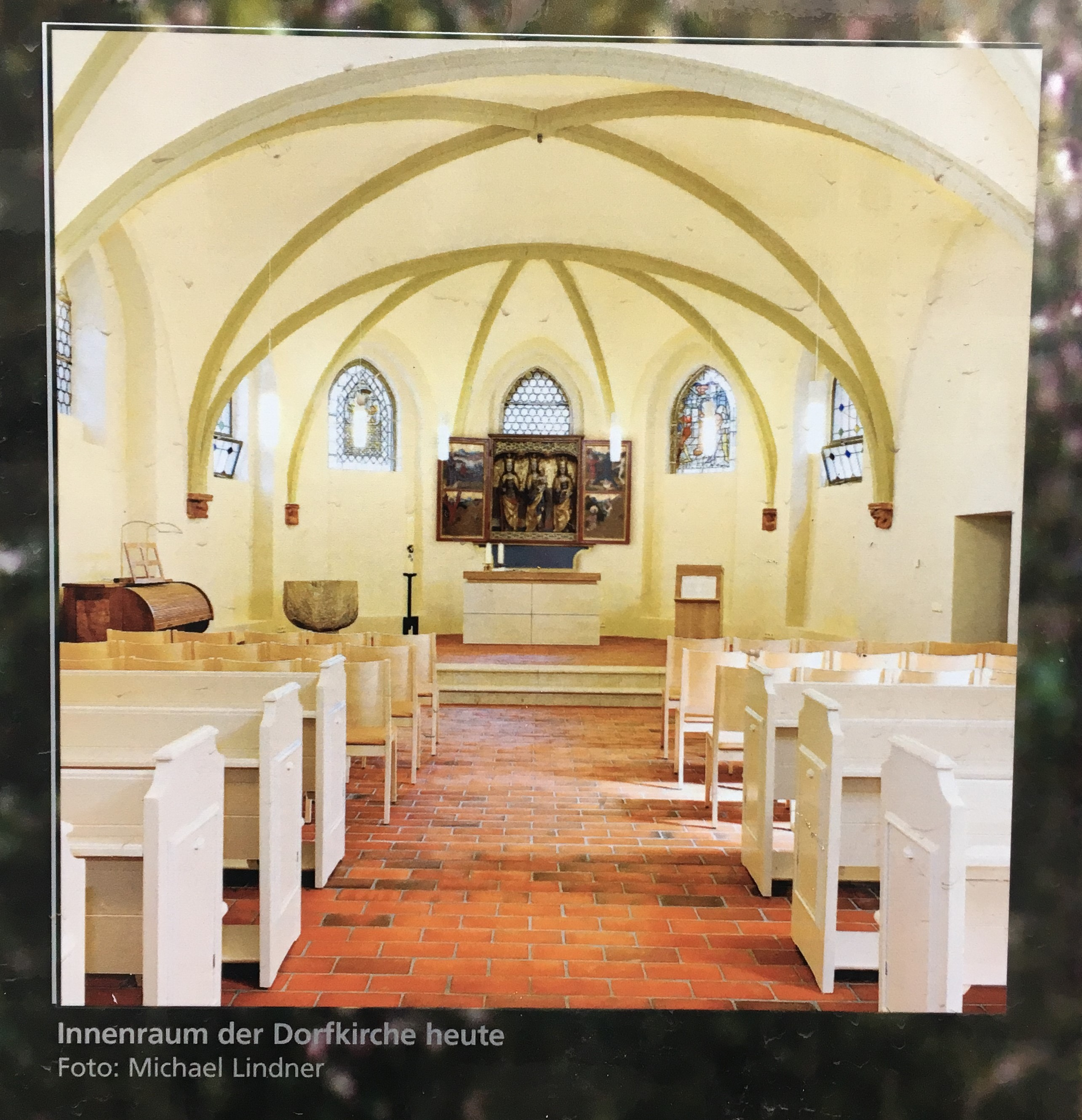 Historische Aufnahmen der Dorfkirche in Stralau, aufgenommen auf einer öffentlich zugänglichen Infotafel vor der Kirche.